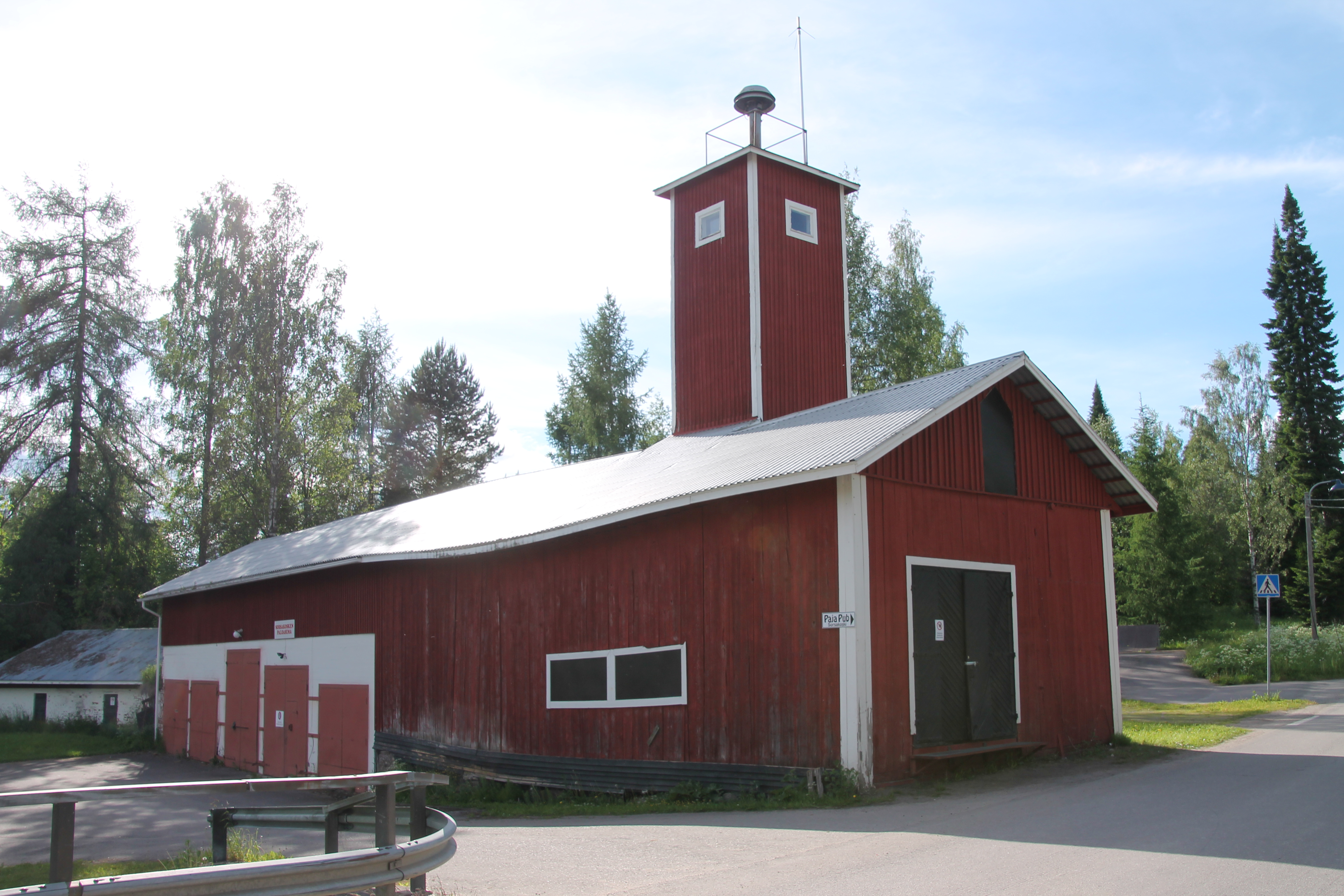 Sorsakosken vanha paloasema.